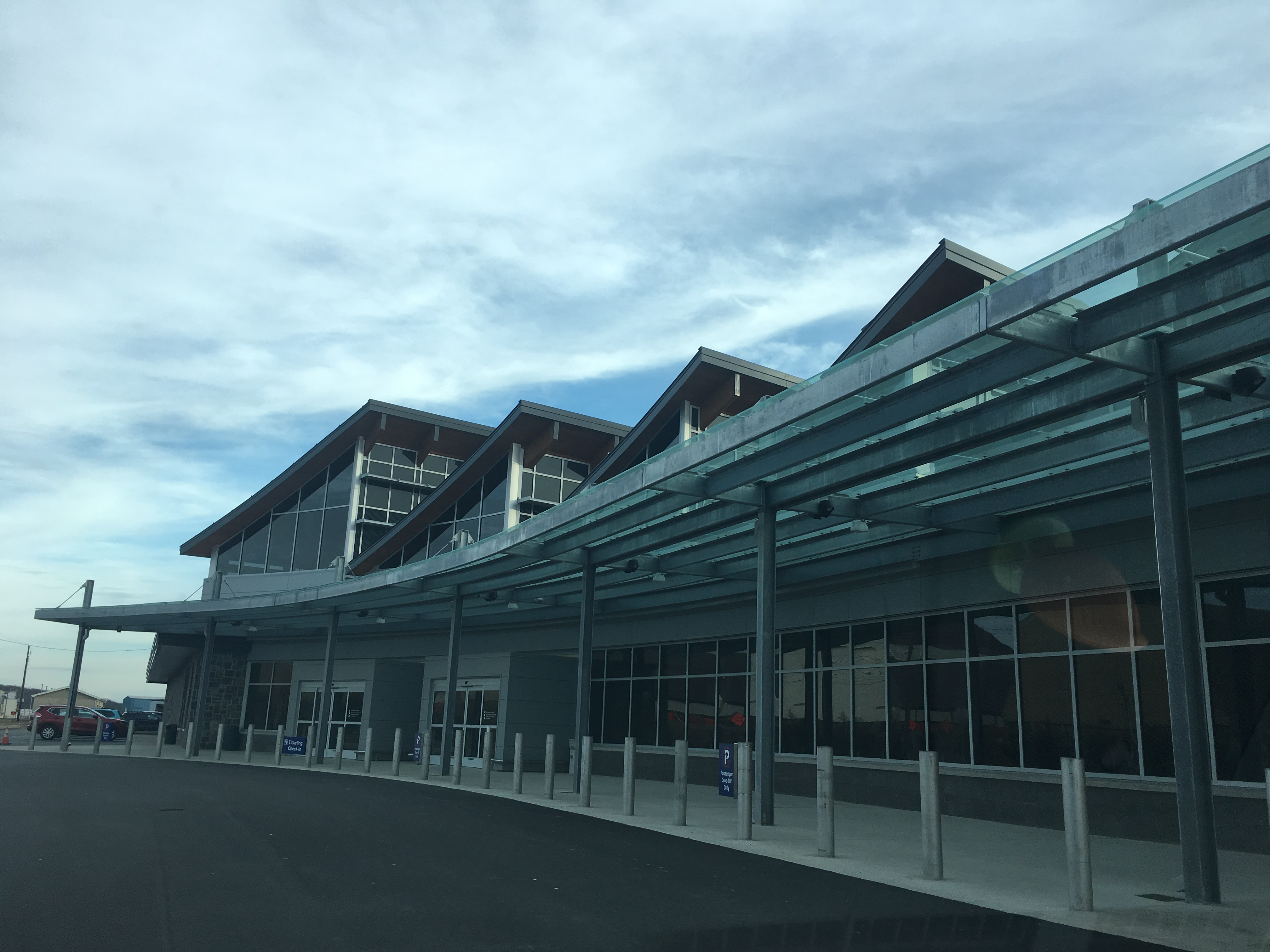 Aéroport principal de l'aéroport régional de Williamsport (KIPT / IPT). IPT est situé à Montoursville, en Pennsylvanie, à 11 km de la ville desservie par Williamsport.